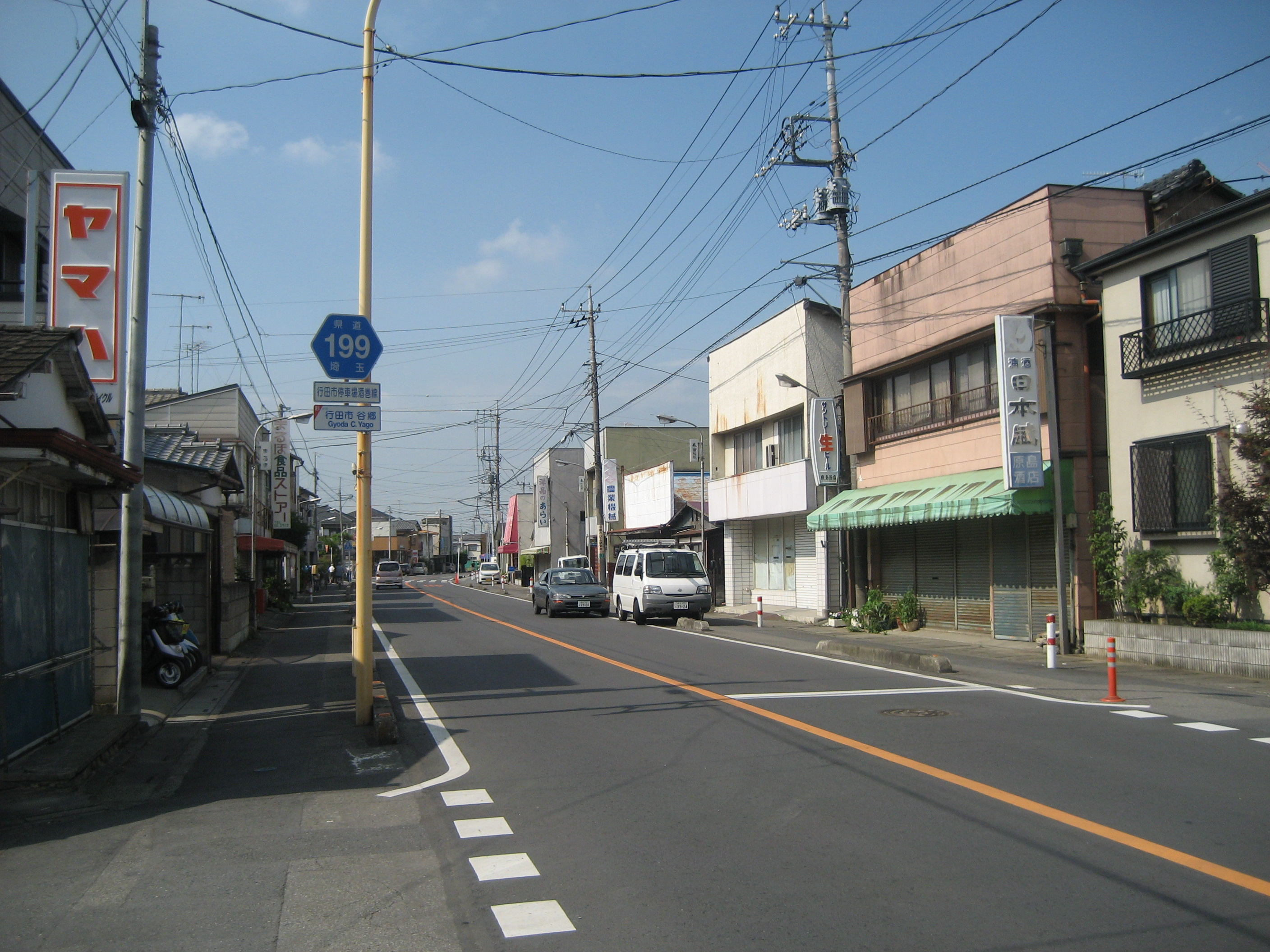 埼玉県道199号線行田市内